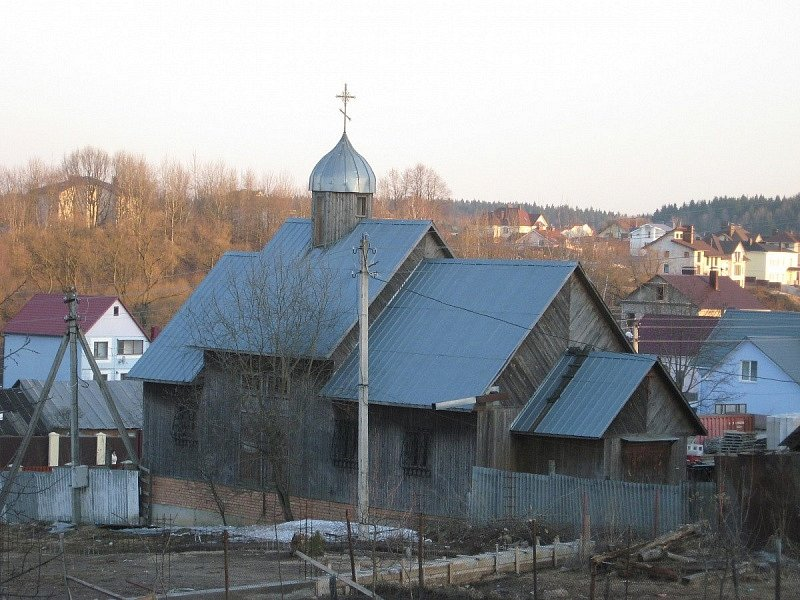 Тарасава. Георгіеўская царква